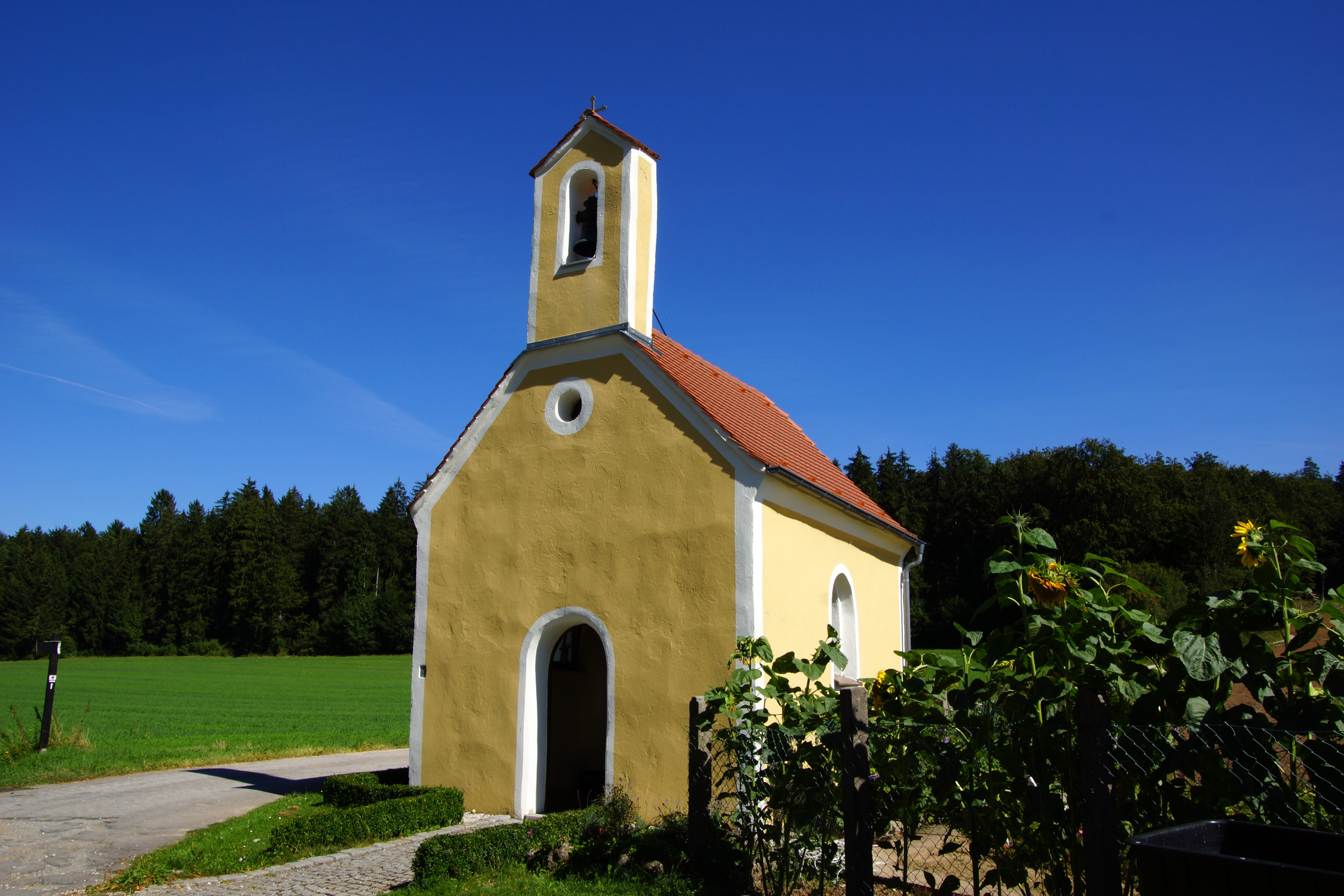 Die Martienkapelle in Richterhof bei Velburg